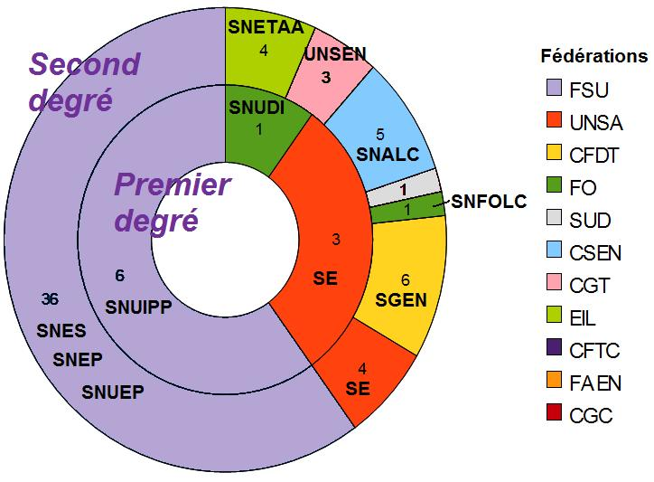 Sièges aux CAPN d'enseignants 2008 d'après [1]